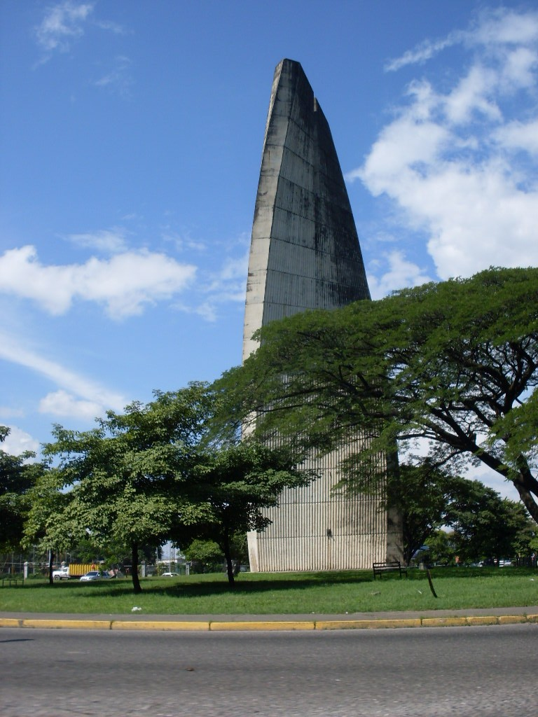 Acarigua, estado Portuguesa - Venezuela (2010)